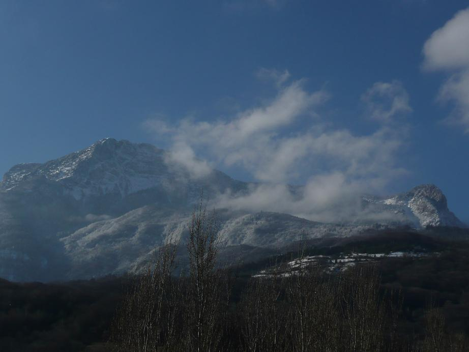 Le Moucherotte depuis Seyssinet